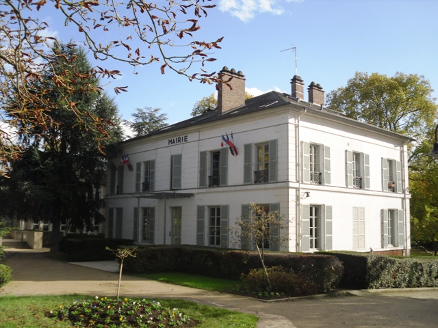 Hôtel de ville de Gif-sur-Yvette (91)